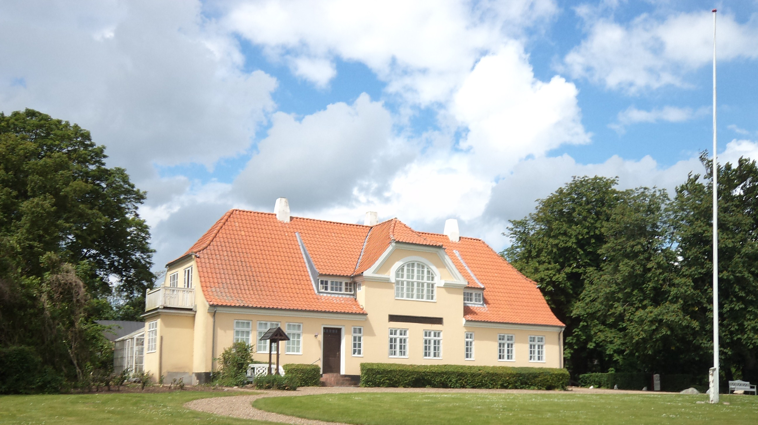 Jenle Jeppe Aakjærs kunstnerhjem. Billede taget fra haven 16. juni 2012.